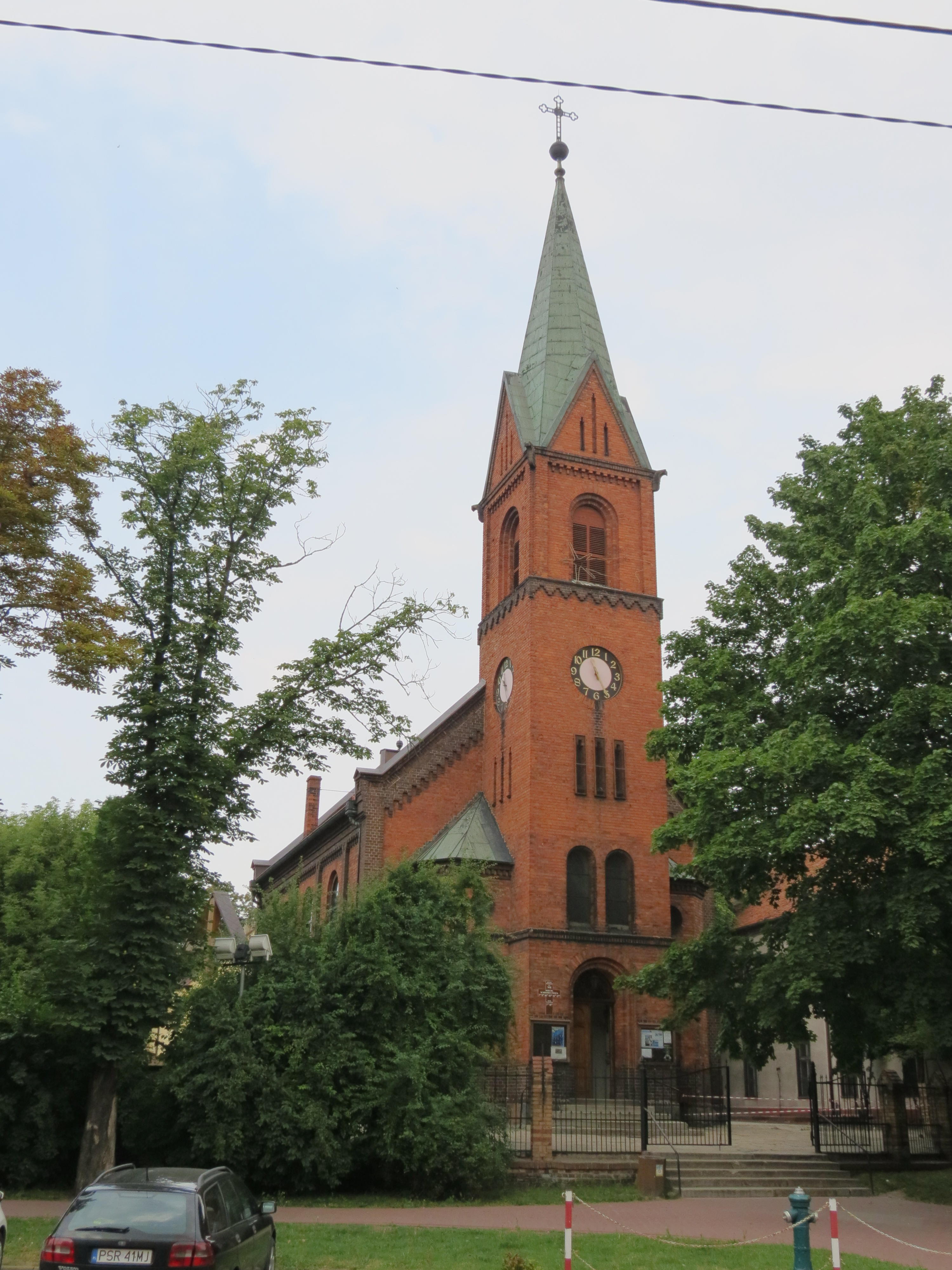 Środa Wielkopolska, kościół ewangelicki ob. rzym.-kat. p.w. Najśw. Serca P. Jezusa, 1883-1888